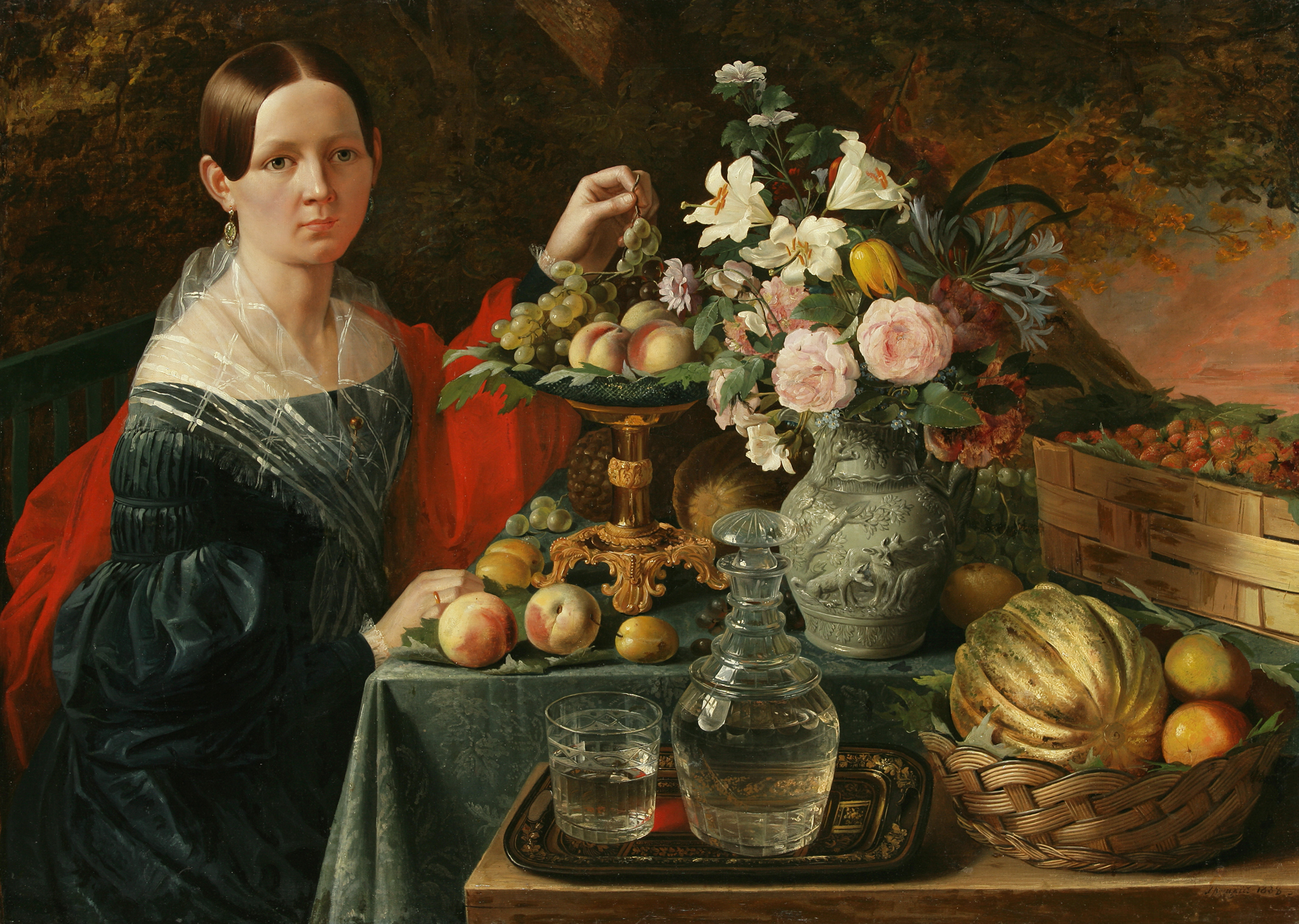 Беларуская (тарашкевіца): Ян (Іван) Хруцкі. Партрэт невядомай з кветкамі і фруктамі